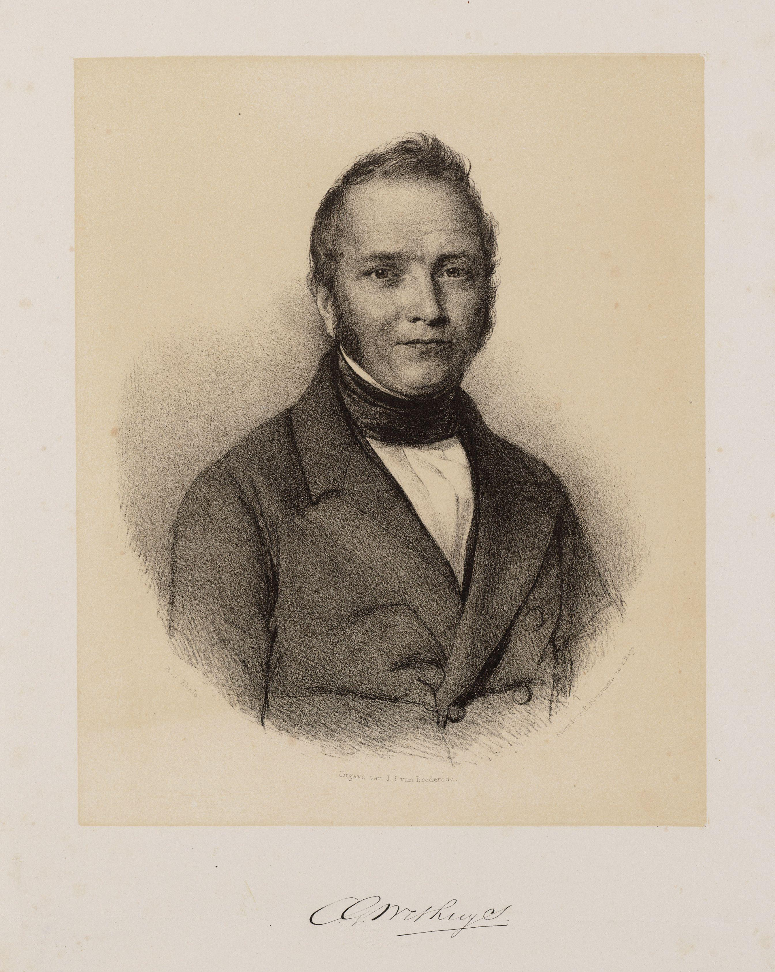 Beschrijving Carel Godfried Withuys (1794 / 14-02-1865) Directeur van de Staatsdrukkerij te Den Haag; Dichter te Amsterdam. Afmetingen: 184 x 144 mm. Documenttype prent Vervaardiger Brederode, J.J. van (uitgever) Ehnle, A.J. (tekenaar) Blommers, P. Collectie Collectie Stadsarchief Amsterdam: tekeningen en prenten Inventarissen Afbeeldingsbestand 010097009490